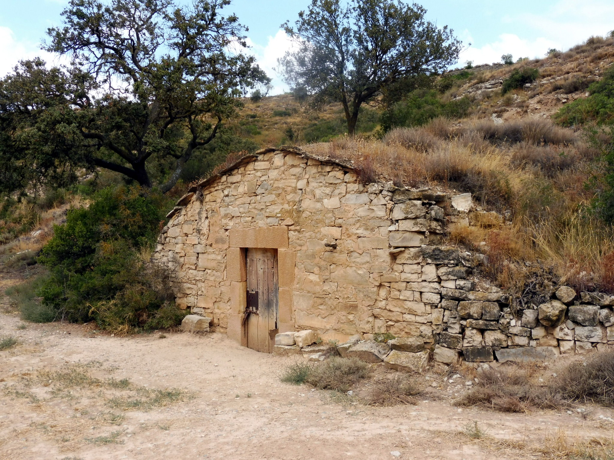 Cabana de volta de les Avalls (Granyena de Segarra) This is a a photo of a natural area in Catalonia, Spain, with id: ES510254